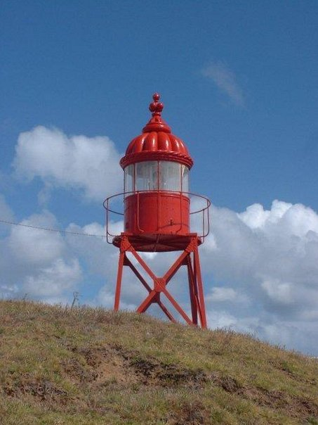 Farol de Santa Clara, freguesia de Santa Clara, concelho de Ponta Delgada, Açores, Portugal